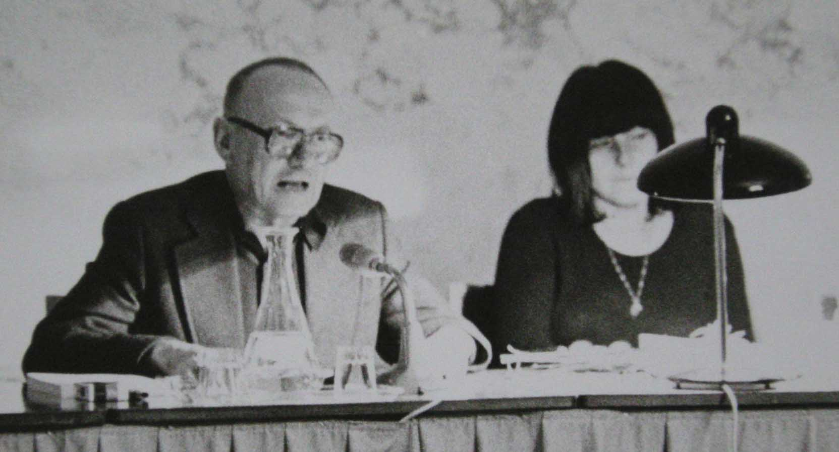 Ernst Jandl and Friederike Mayröcker, public reading, 1974-11, Vienna, Austria